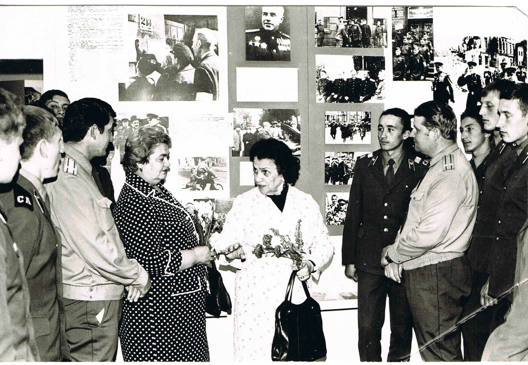 Супруга Берзарина с дочерью у экспозизии "Берзарин Н.Э." в музее Берлинской бригады. Берлин-Карлхорст 1983